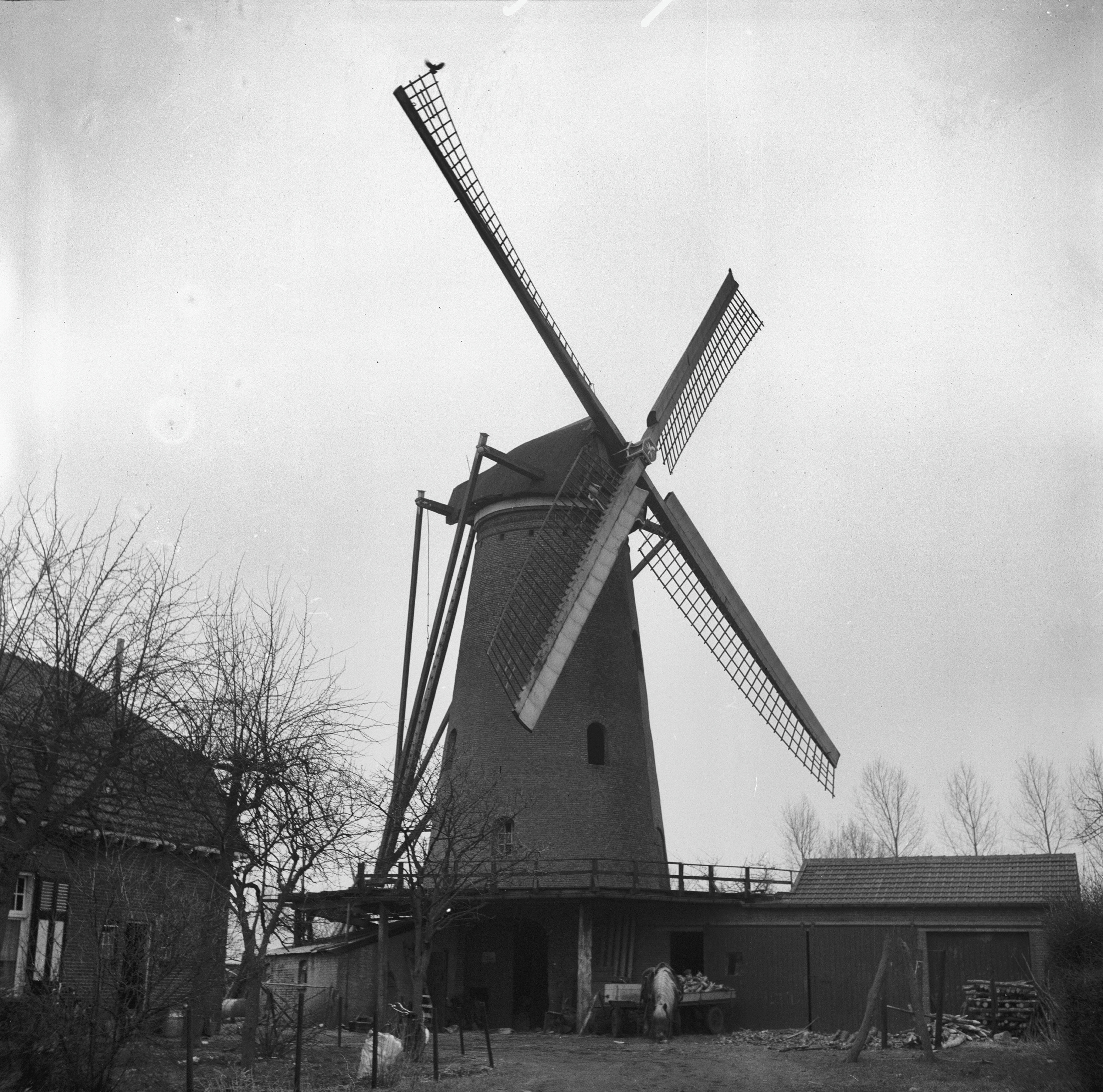 Diversen: Korenmolen